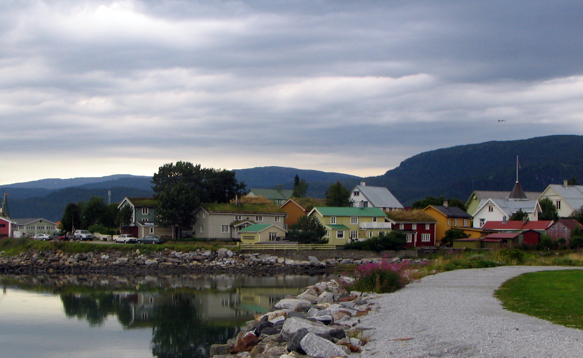 Mo i Rana, Nordland, den gamle bebyggelsen på Moholmen Mo i Rana, Nordland, the old village Moholmen